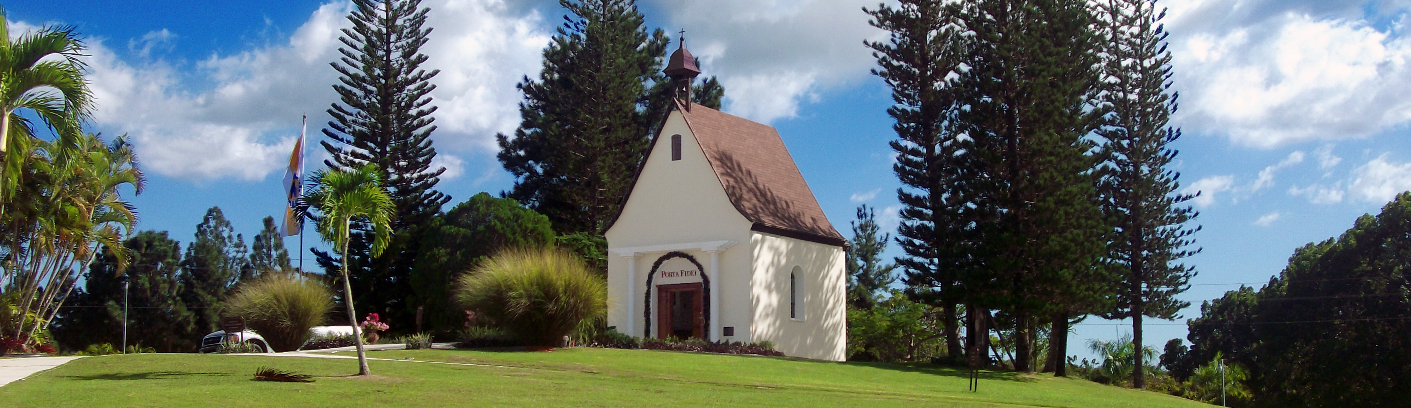 Santuario Schoenstatt.